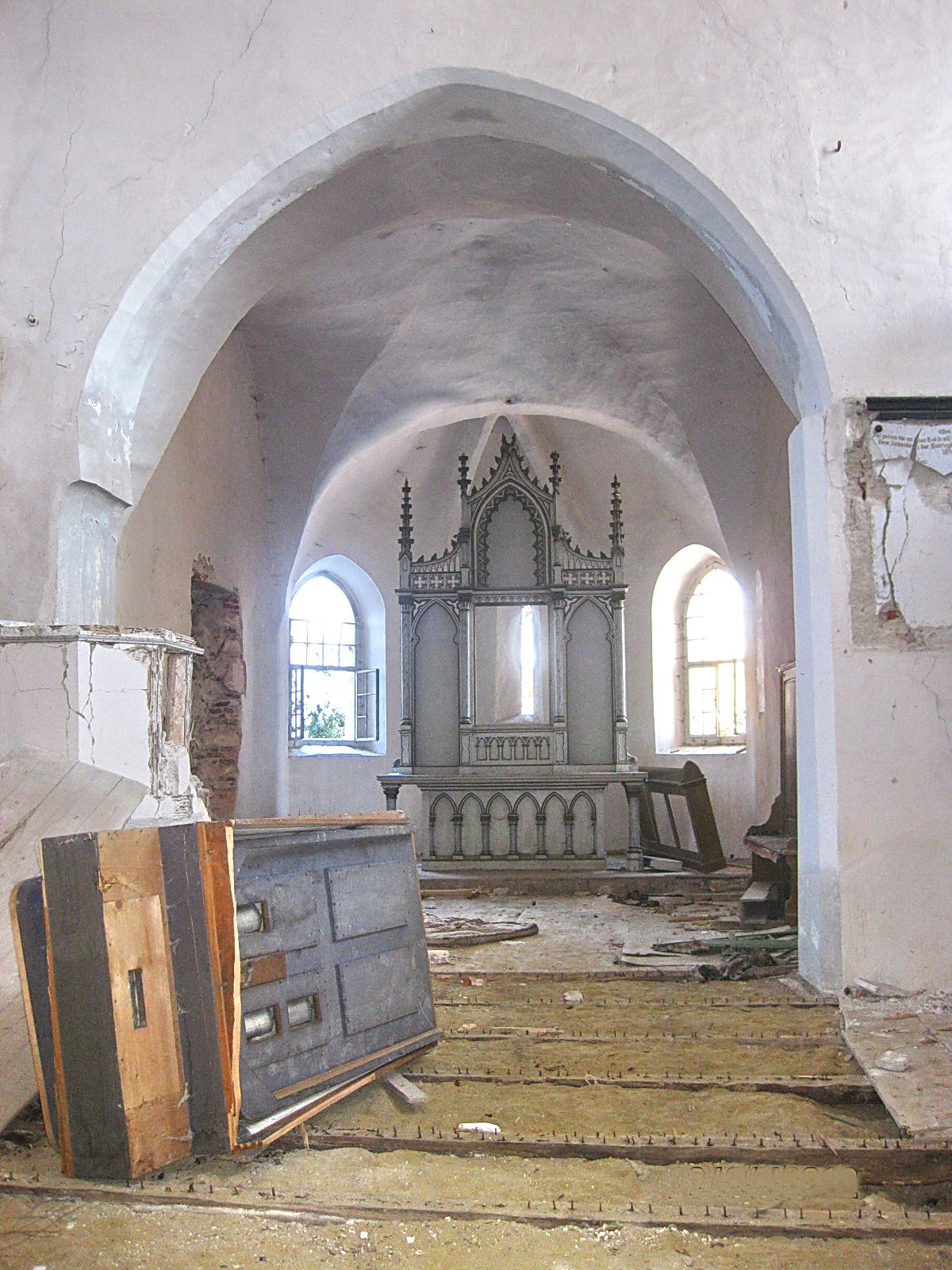 Biserica Luterană din Dobârca (interior), judeţul Sibiu, Transilvania (fotografie din colecţia Marcel Muntean, Orăştie)